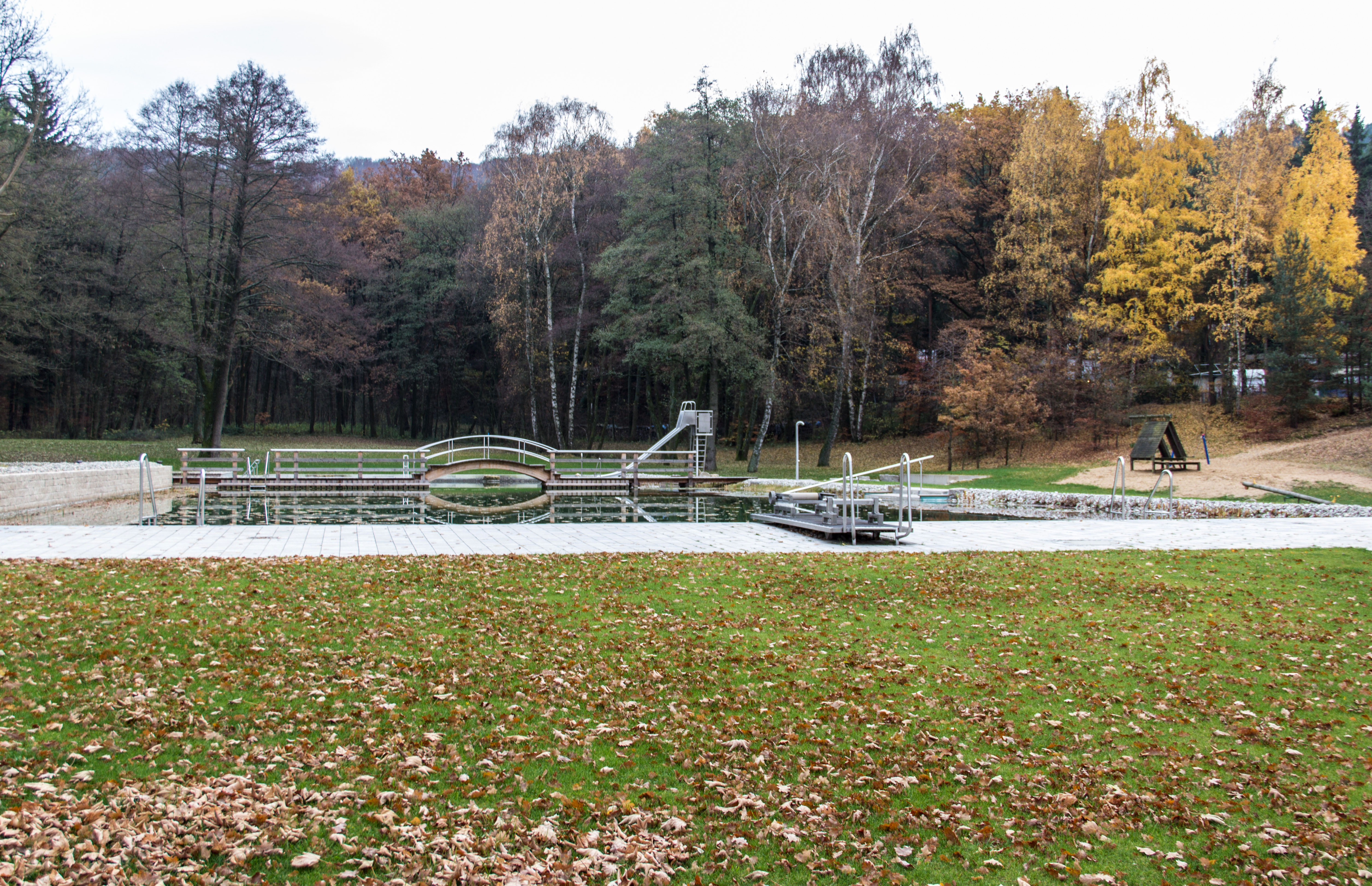 Weissenbrunn (Leinburg), Freibad